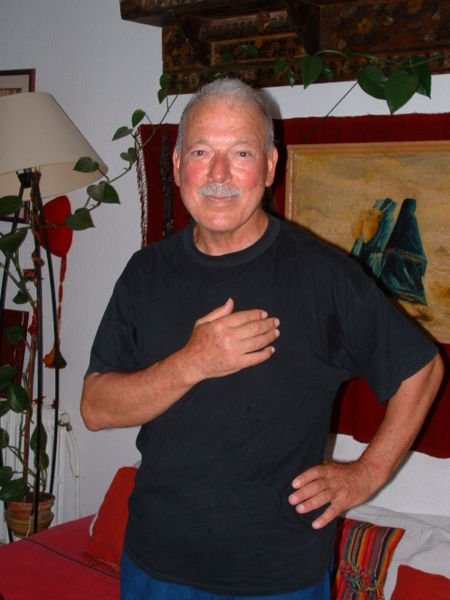 Photographie prise par J. Pipon du poète mahdois Moncef Ghachem, à son domicile, et diffusée avec l'accord (du photographe occasionnel et) du poète à qui vont mes remerciements (Asram)